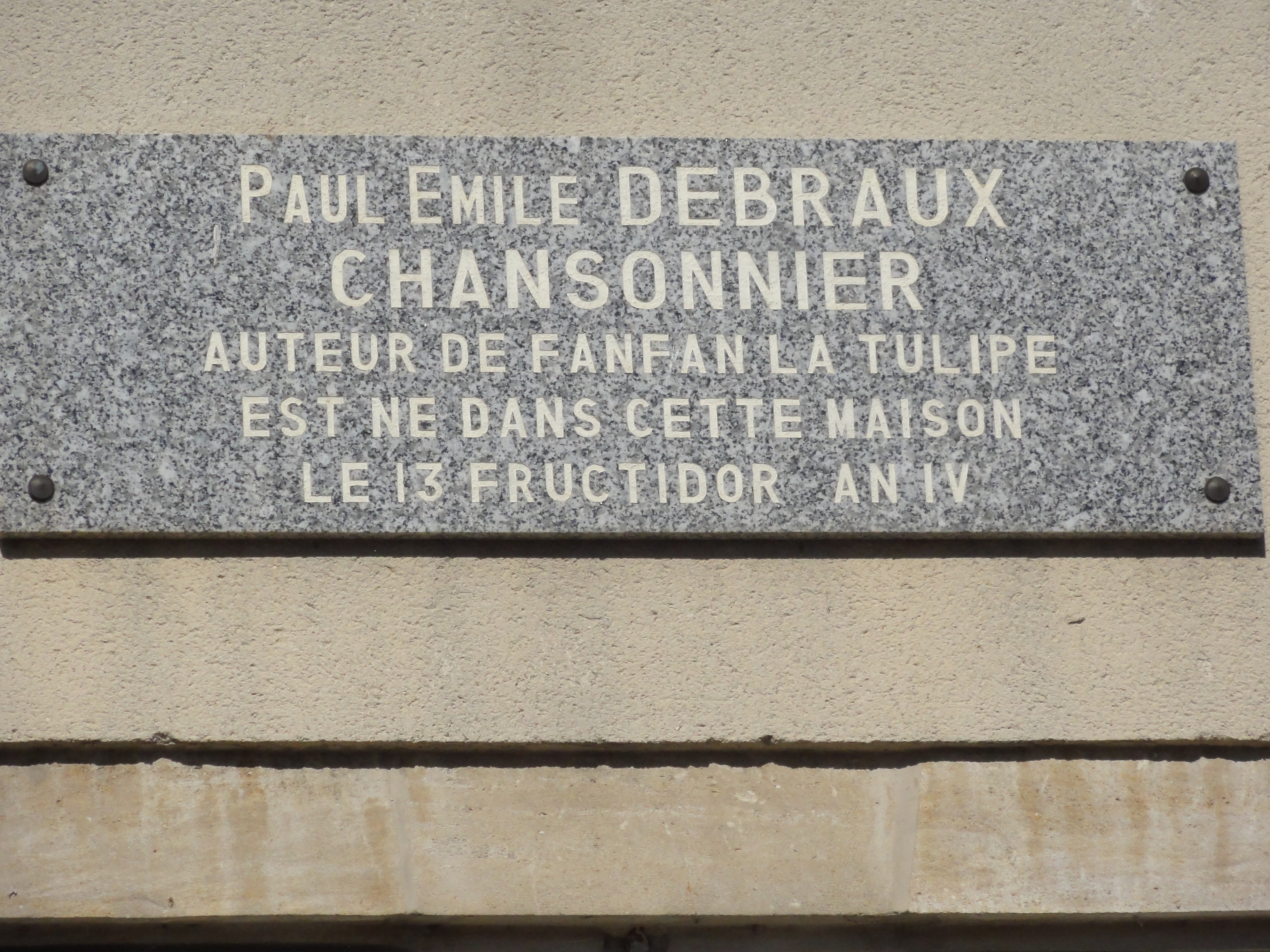 Ancerville (Meuse) maison natale Paul Emile Debraux, plaque